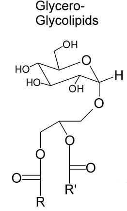 Estructura molecular de un glicoglicerolipido